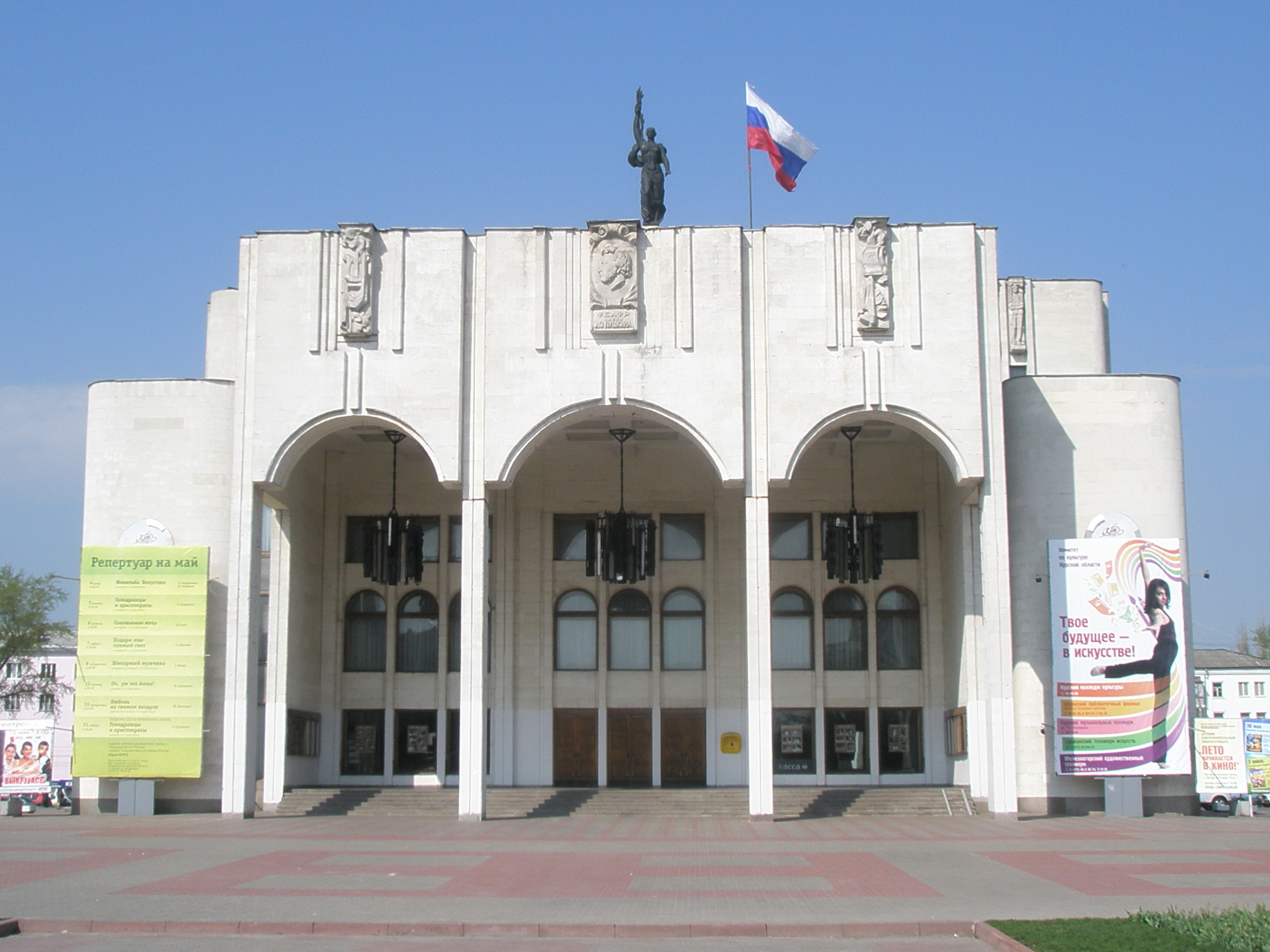 Курский драматический театр